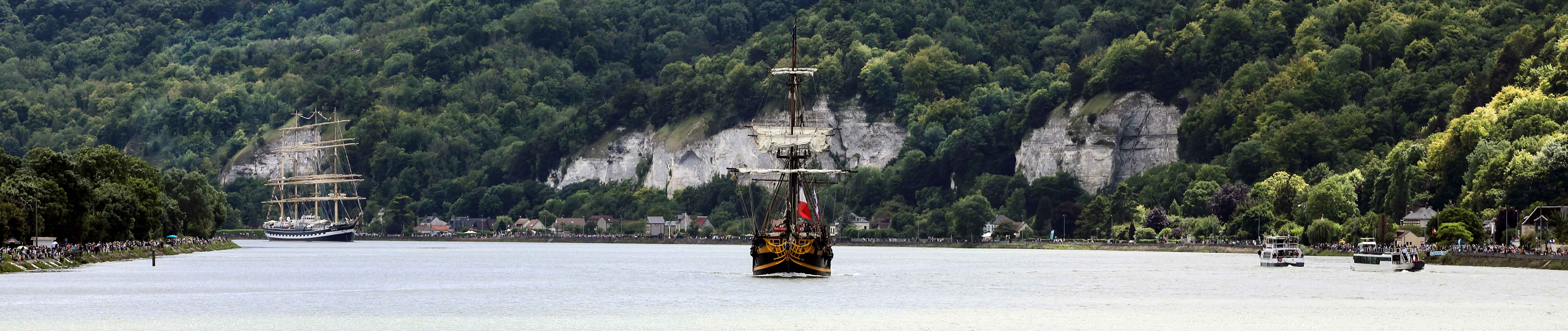 Départ des voiliers le dernier jours de l'armada edition 2019